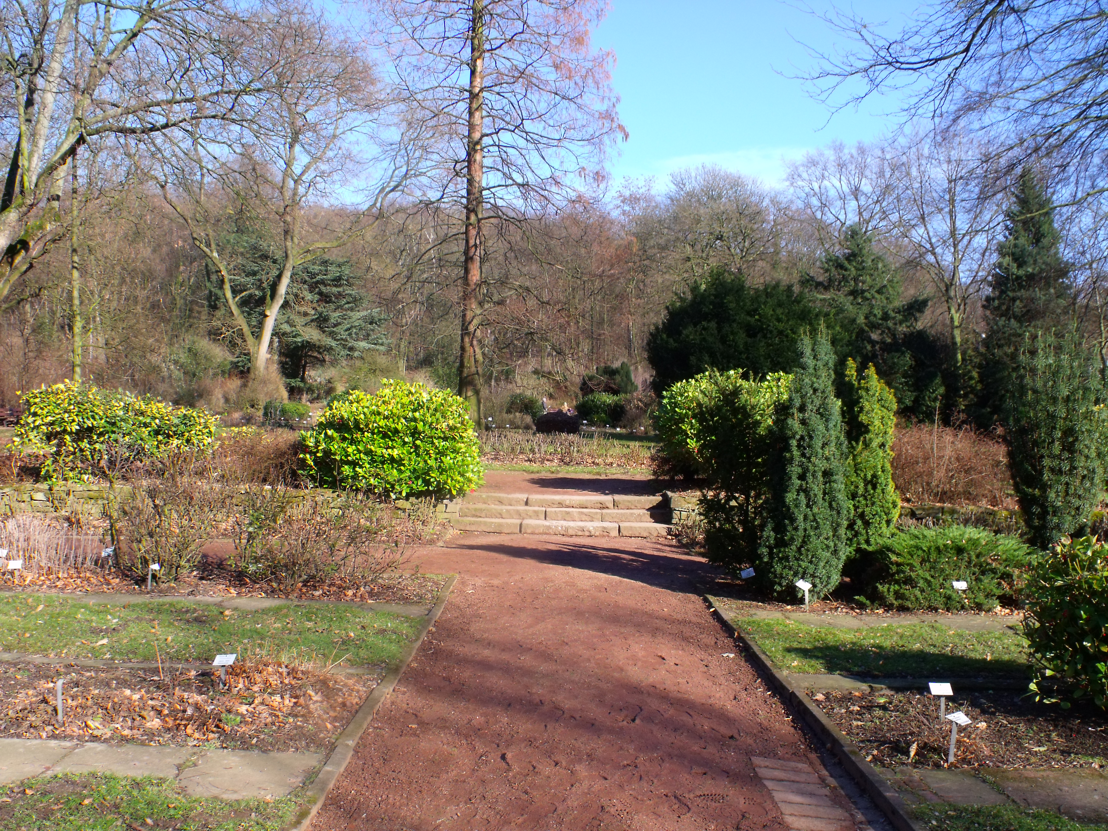 Wege und Gelände des Botanischengarten Duisburg